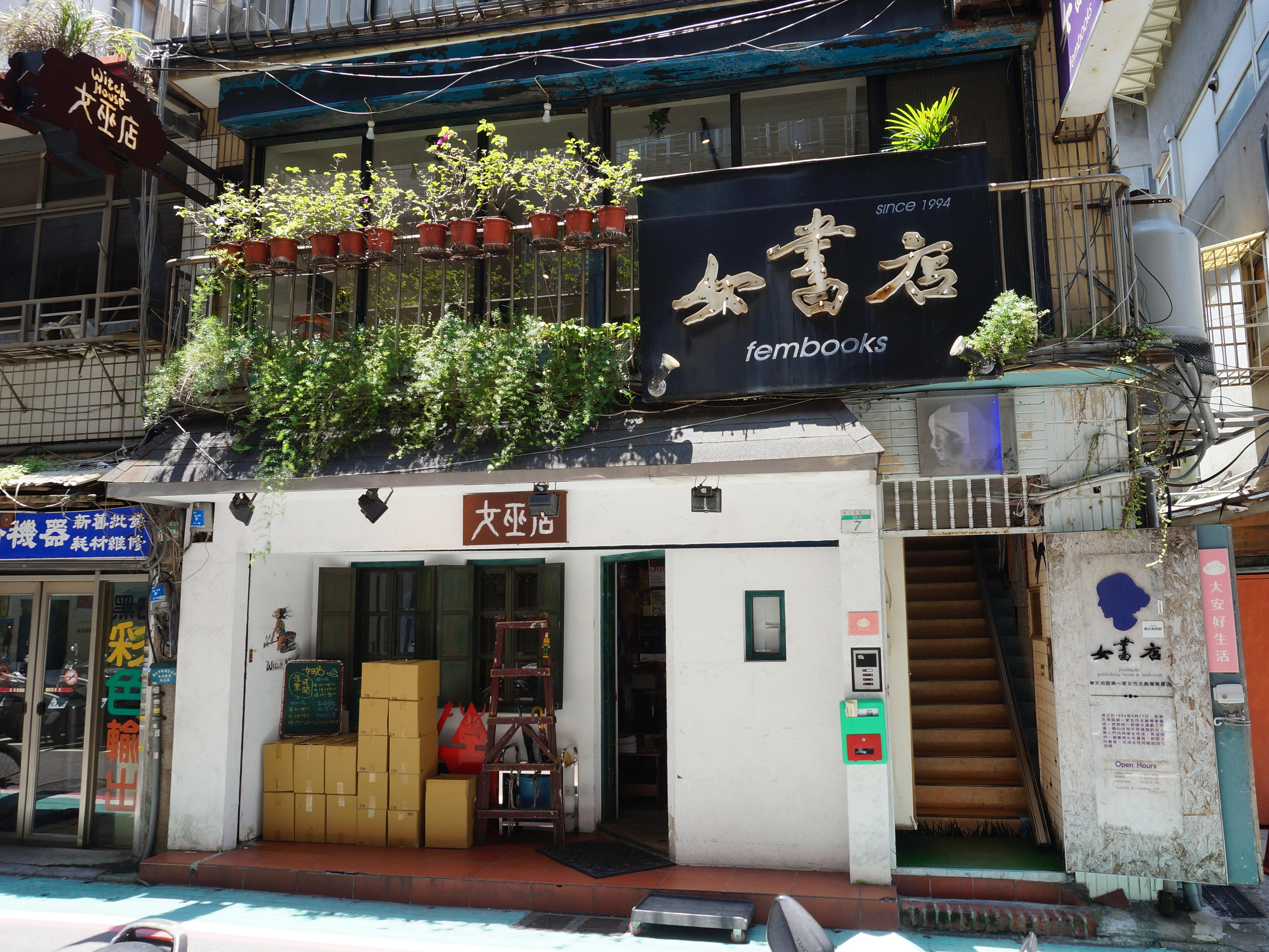 女巫店、女書店與女書文化，地址：臺北市大安區新生南路三段56巷7號。女巫店在1樓，女書店與女書文化在2樓。